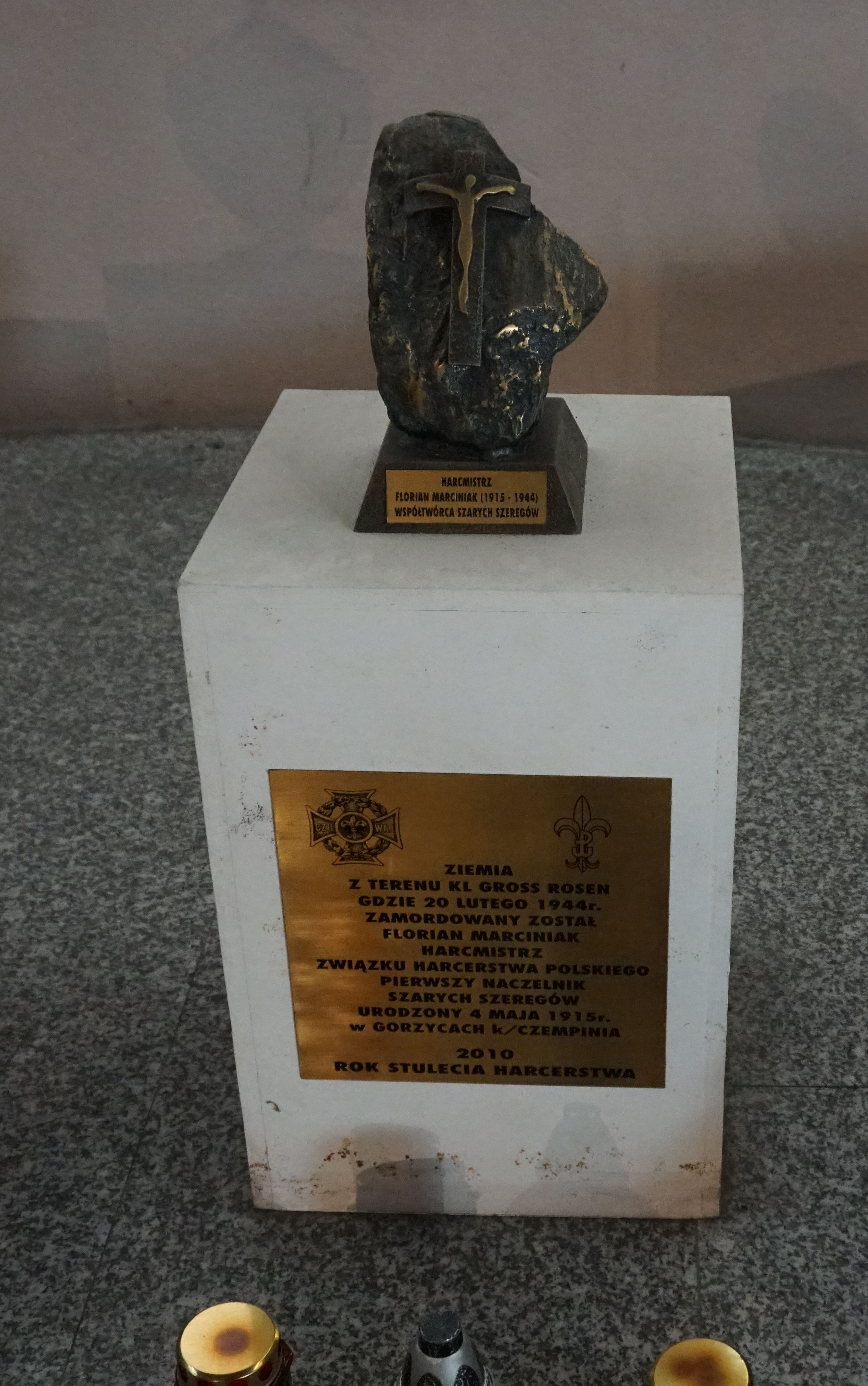 urna z prochami Floriana Marciniaka w Krypcie Zasłużonych Wielkopolan